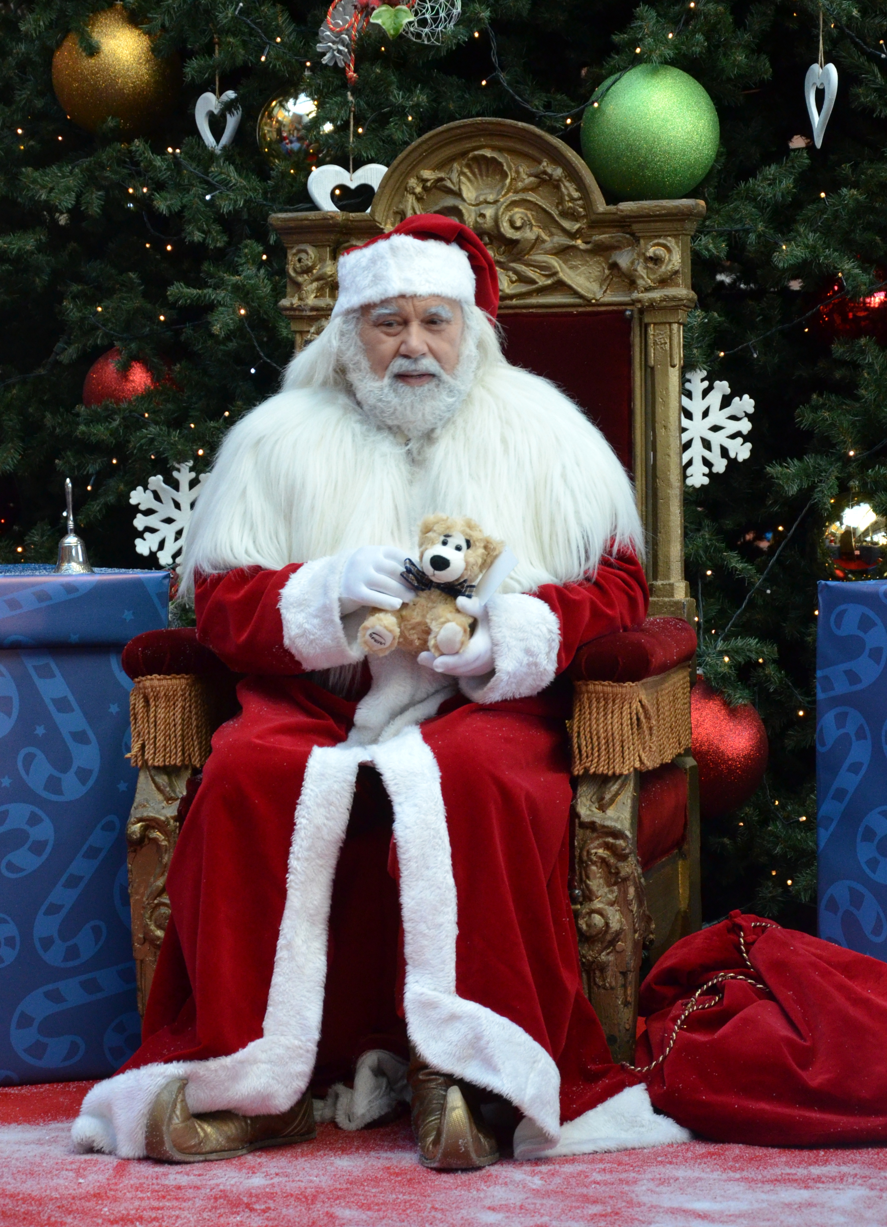 Die Darstellung des Weihnachtsmanns in Bielitz, Bielsko